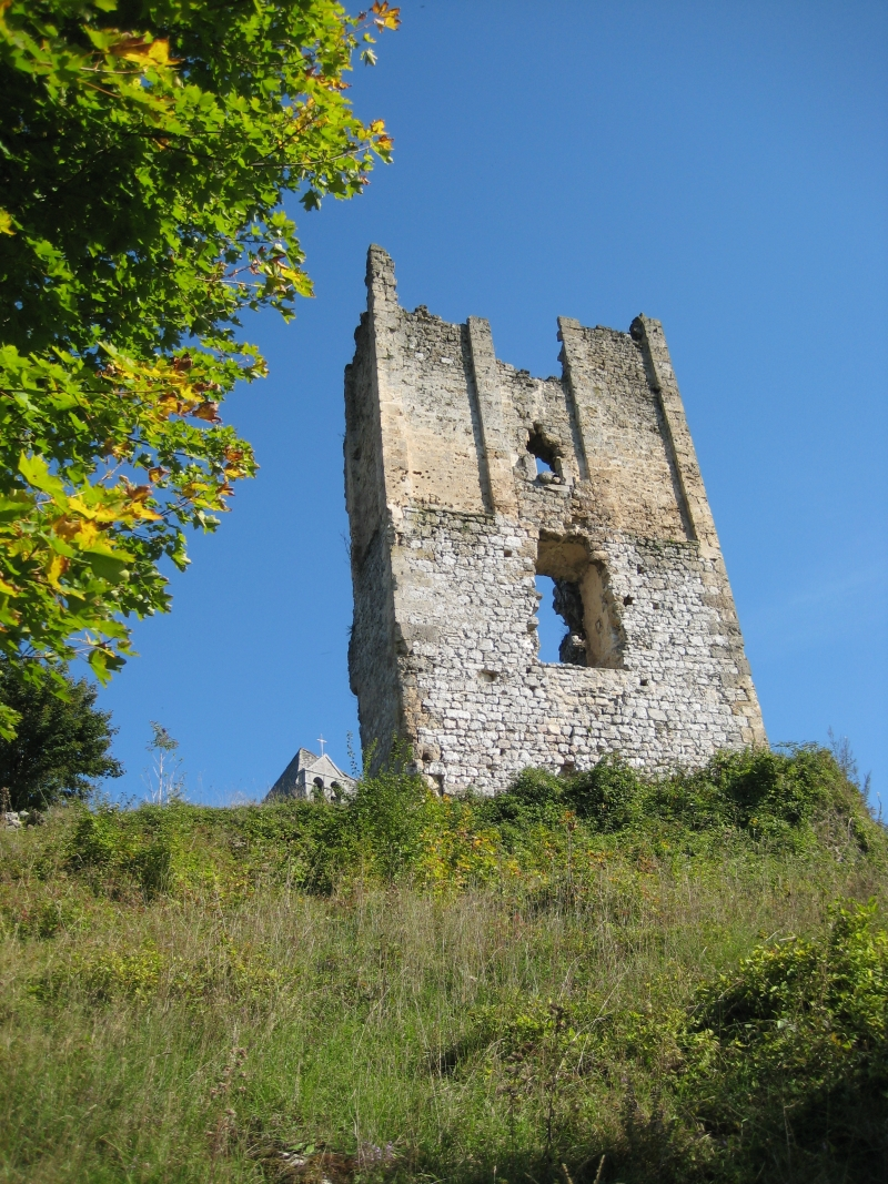 Sokolac, Brinje, Croatia